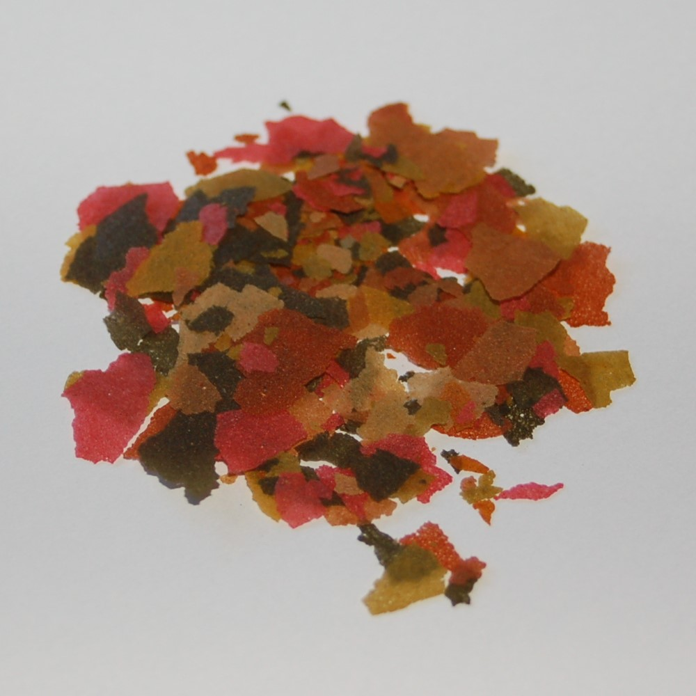 Flockenfutter für alle Zierfische